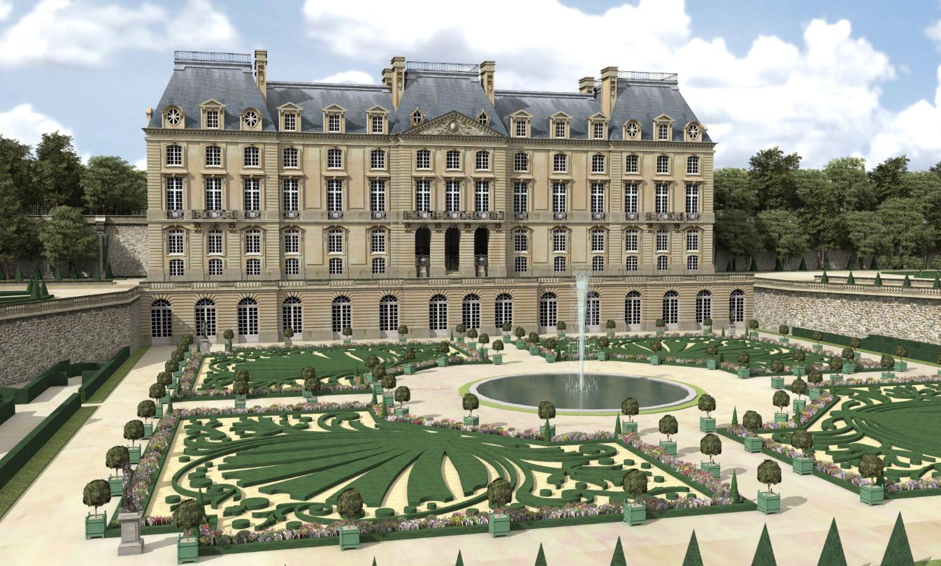 Restitution 3D du château-neuf de Meudon à son apogée, vers 1709. Franck Devedjian et Hervé Grégoire, 2013.